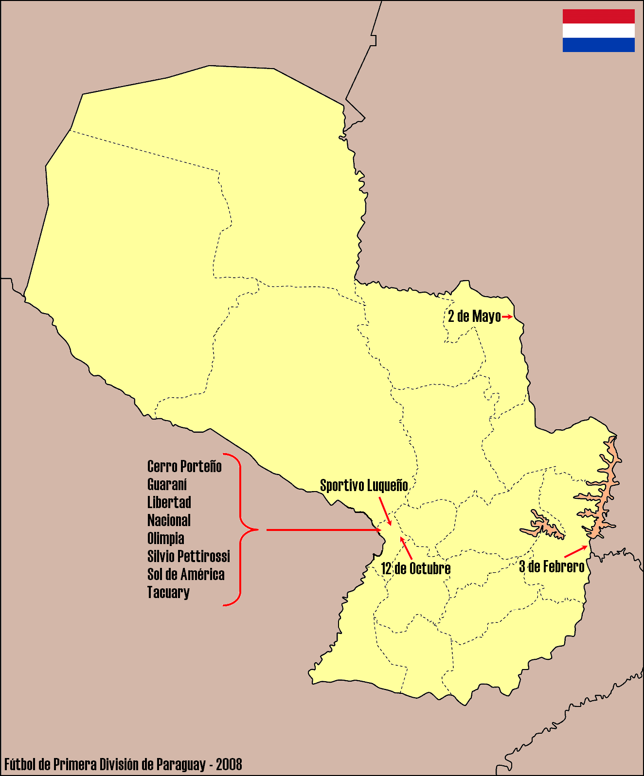 Mapa que describe la ubicación exacta de los 12 equipos participantes de la primera división paraguaya de fútbol durante el año 2008.